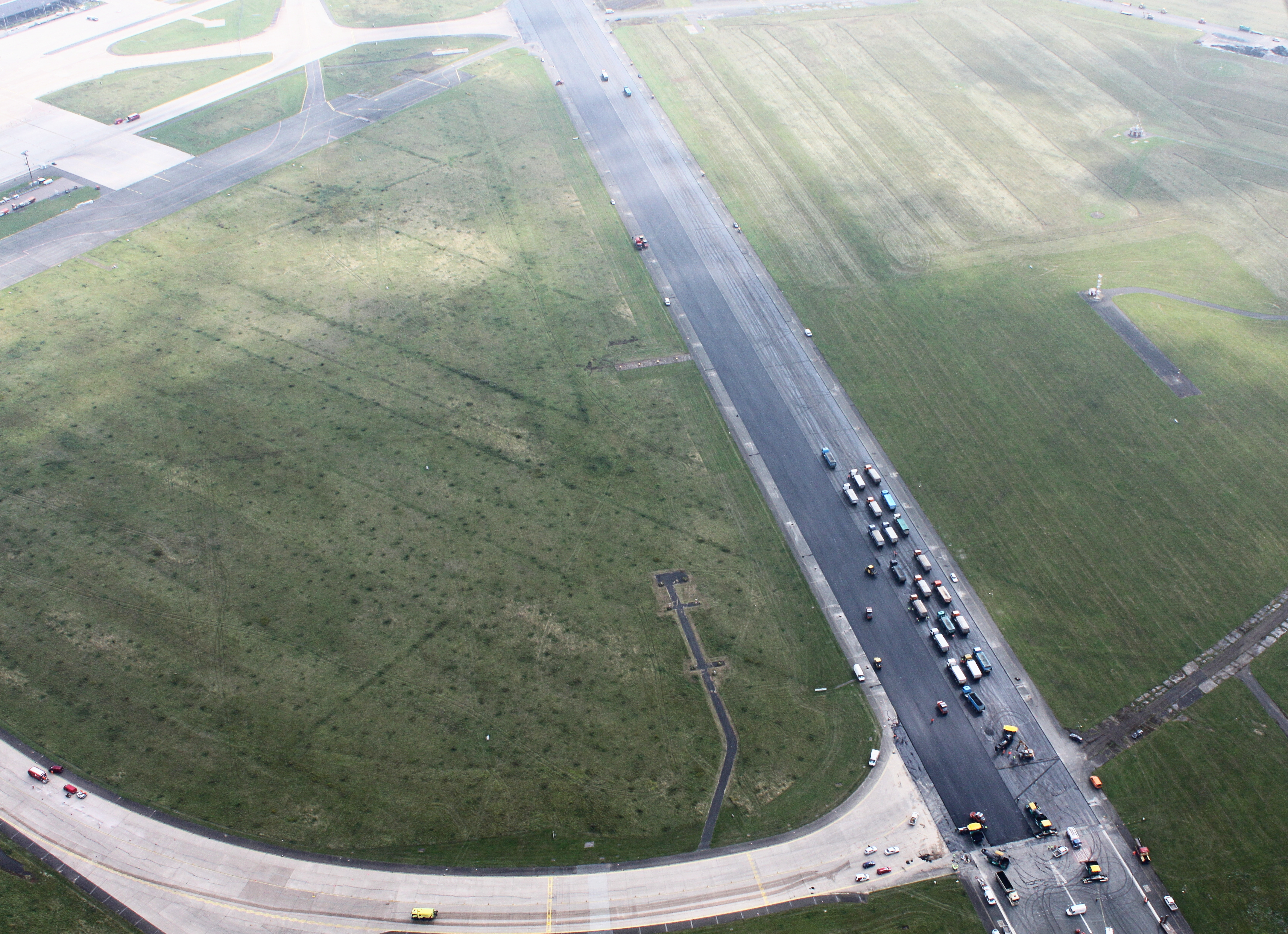 Flughafen Bremen: die 2 km lange und 45 m breite Start- und Landebahn soll innerhalb einer Woche (genauer: 6 Tage; vom 6. bis 12. August, 6 Uhr) eine neue Asphaltdecke bekommen. Deshalb ist der Flughafen gesperrt und auf der Start- und Landebahn stehen die Lkw's, die den Asphalt anliefern, dicht an dicht. Die Sperrung der Landebahn wird Flugzeugen zusätzlich mit einem ausgelegten, großem, weißen Kreuz angezeigt. Wegen der Sperrung des Flughafens befinden sich fast keine Flugzeuge am Flughafen.